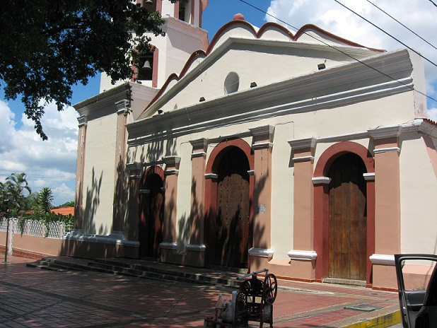 Iglesia de Cabudare